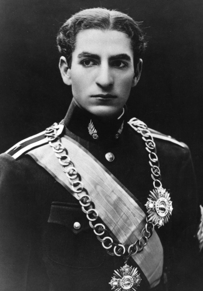 Le prince héritier d'Iran Mohammad Reza, vers 1936